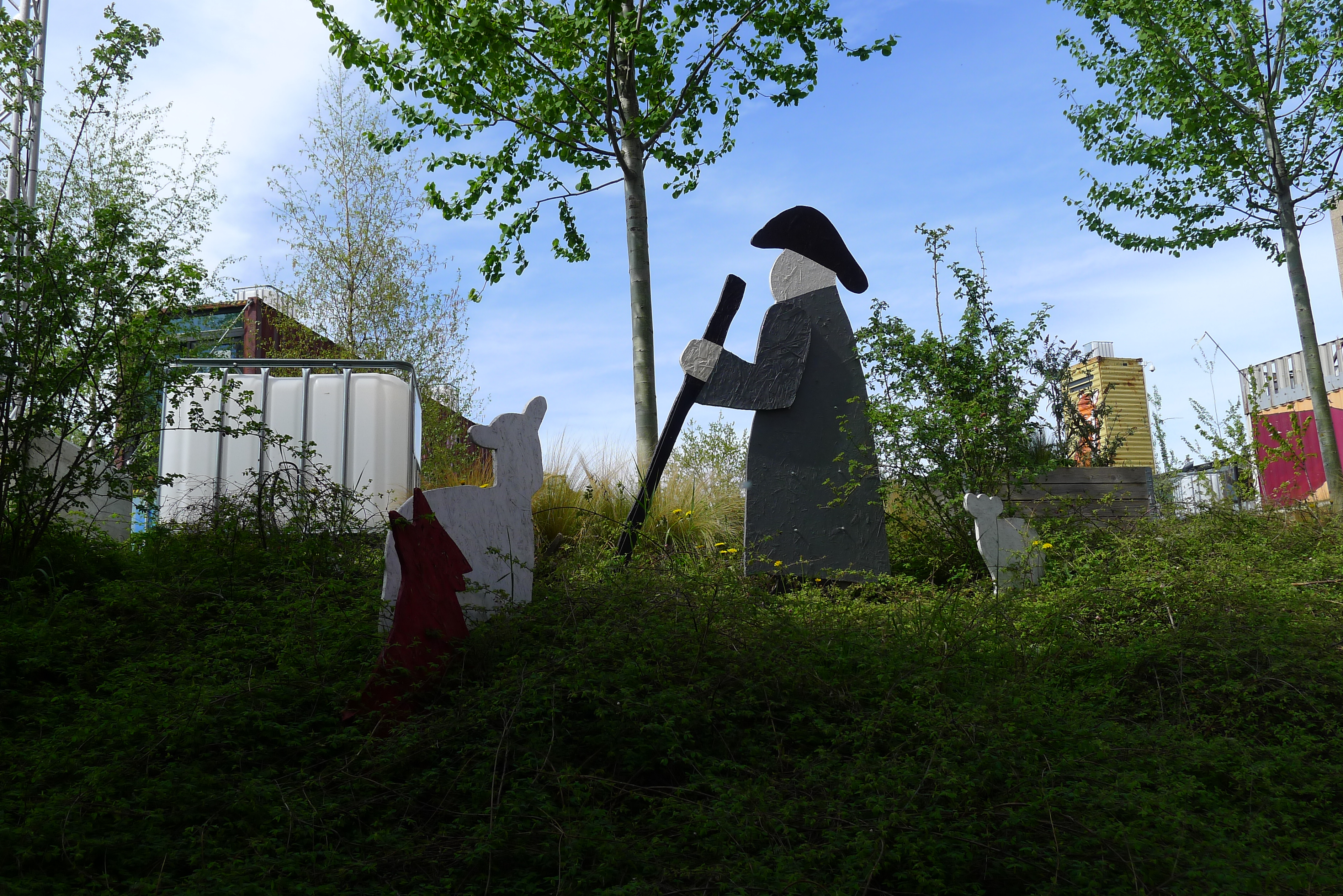 Die im Werksviertel stehende Schafe sind Teil des Kunstprojekts "Urbane Transhumanz" von Walter Kuhn. Ursprünglich war es eine 60-köpfige hölzerne Schafherde, die auf dem Münchner Olympiaberg „weidete“. Die "wandernde" Schafherde kann als Metapher für die weltweite Migration verstanden werden. Später war sie in München an verschiedenen Orten zu sehen, wie hier im Werksviertel an einer Tiefgarageneinfahrt.